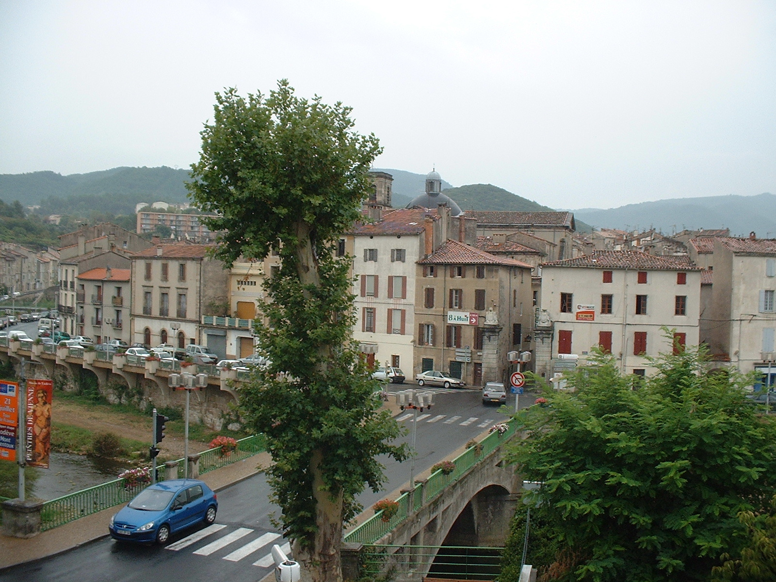 Lodève (Hérault, France).Pont de la Bourse.